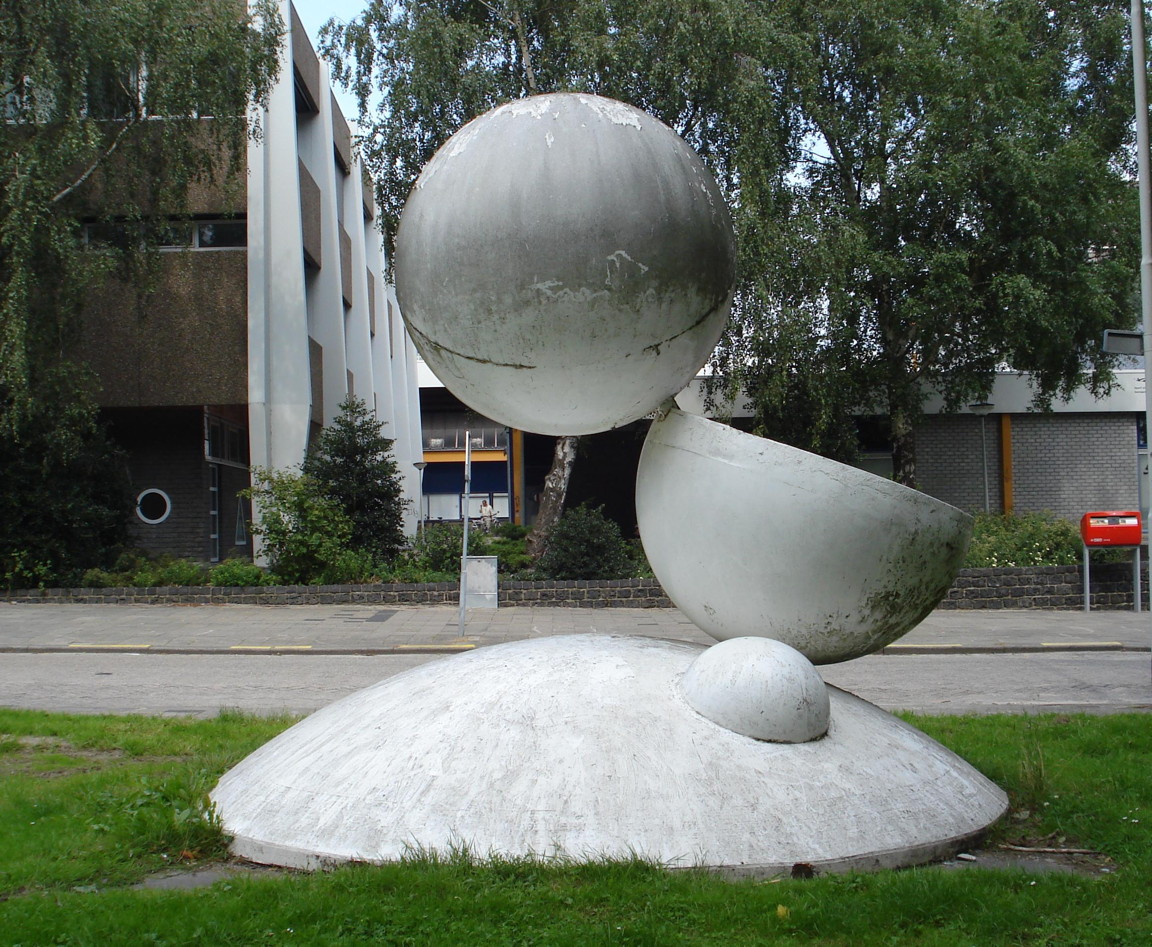 Rotterdam, Ommoord, Briandplaats. Kunstwerk "De Bollen" van Hans van der Plas. Rotterdam/The Netherlands.